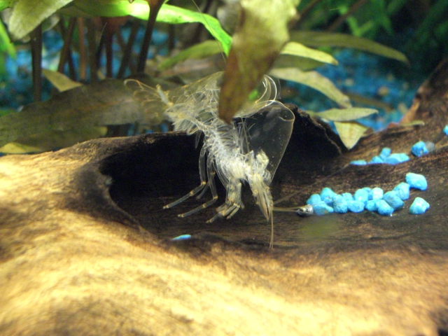 Das Bild zeigt den Chitinpanzer einer Amanogarnelekurz nach der Häutung.